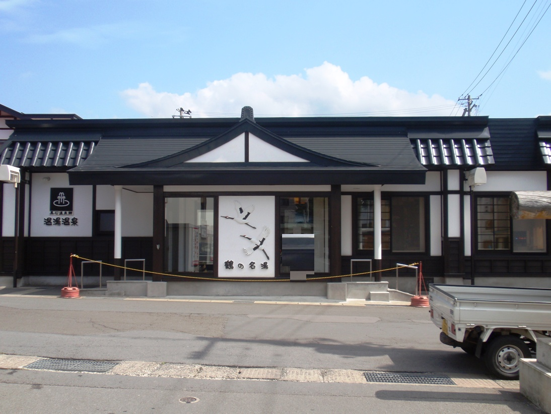 青森県温湯温泉鶴の湯